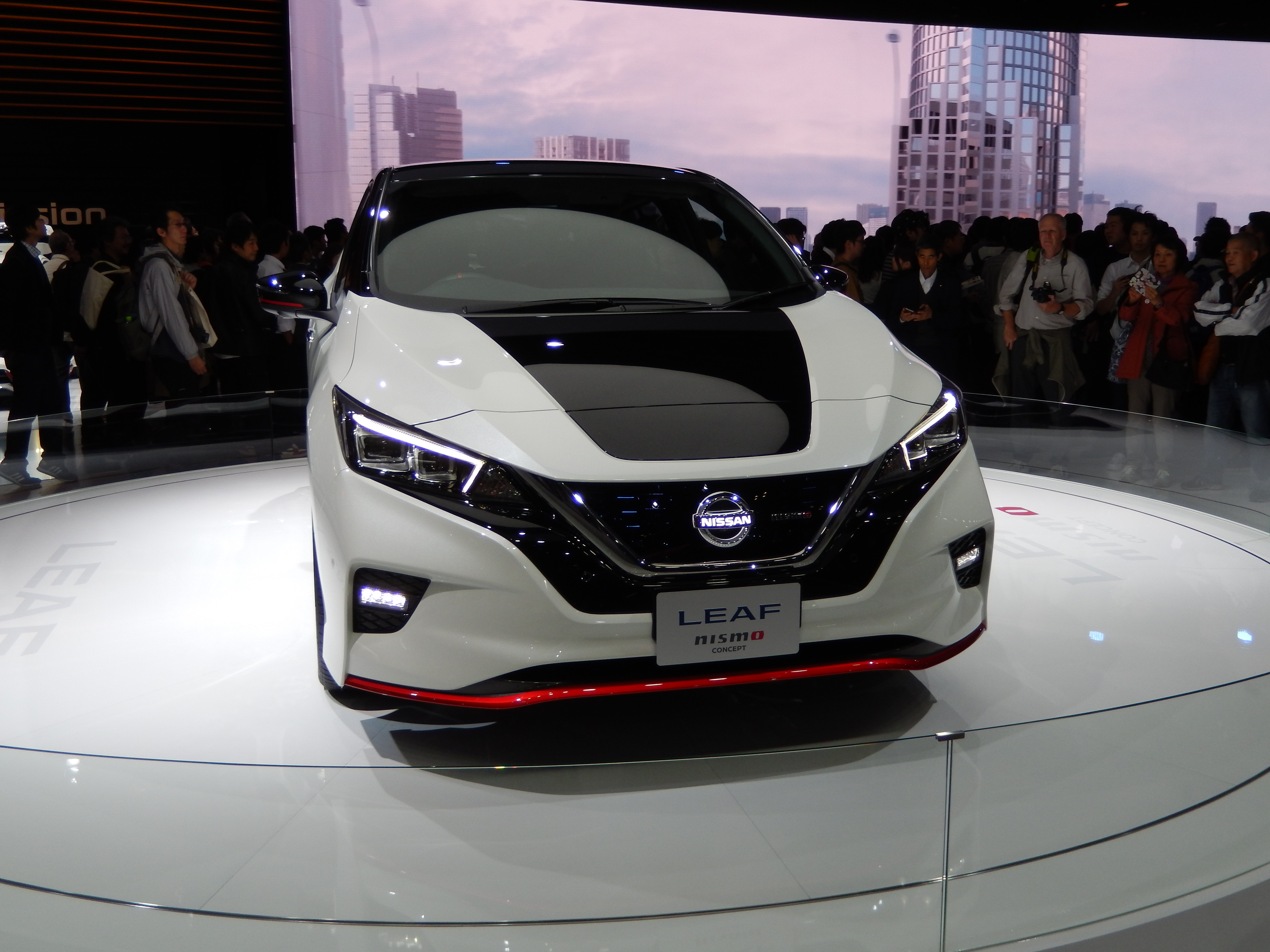 第45回東京モーターショー2017にて投稿者自身による撮影。